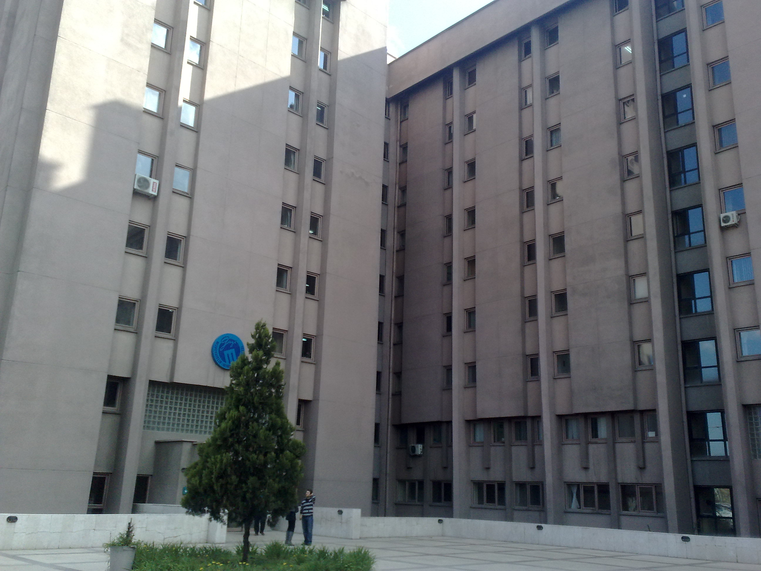 Gazi Üniversitesi'nden bir görüntü.